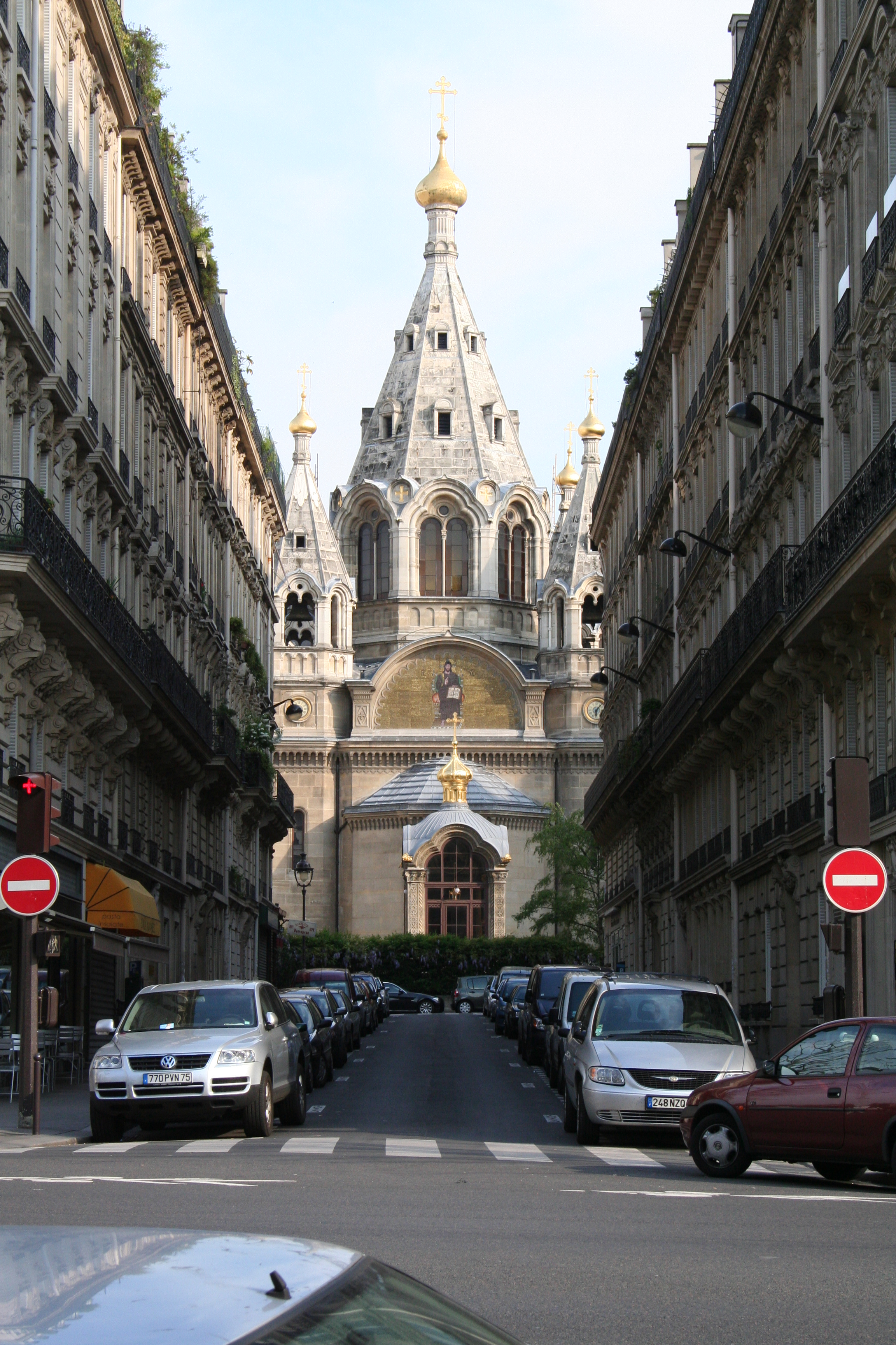 Boulevard Courcelles, Paris VIII.